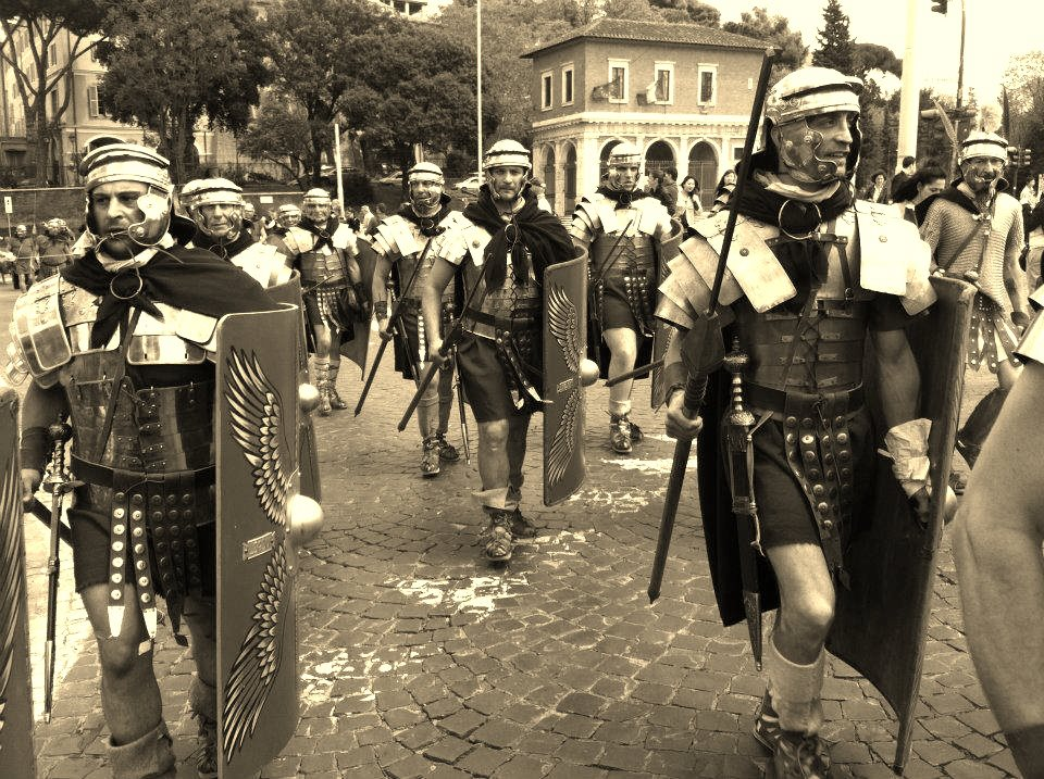 Re-enactment of the Legion XX v.v.